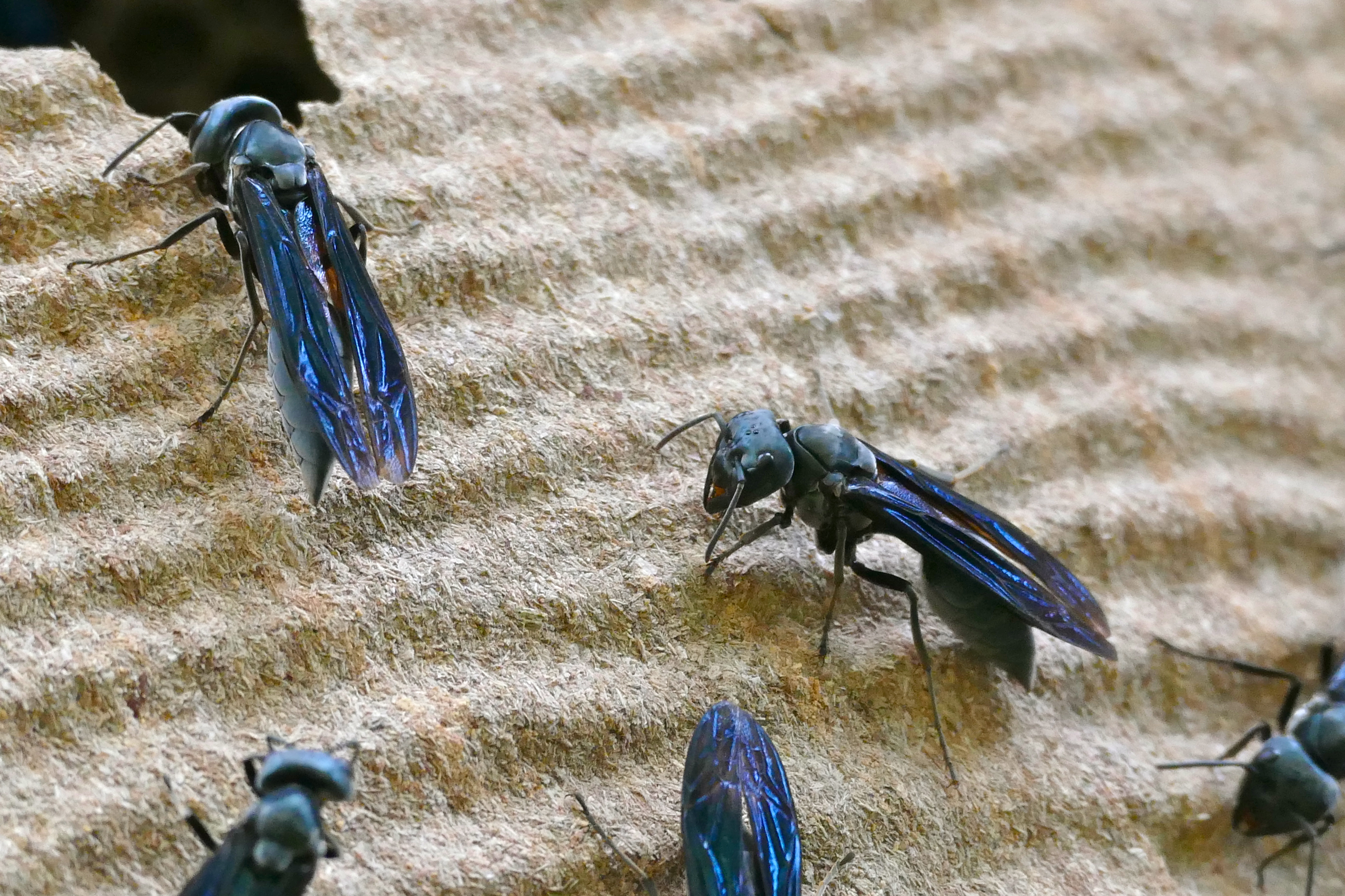 Pouso Alegre, Transpantaneira, Poconé, Mato Grosso, BRAZIL